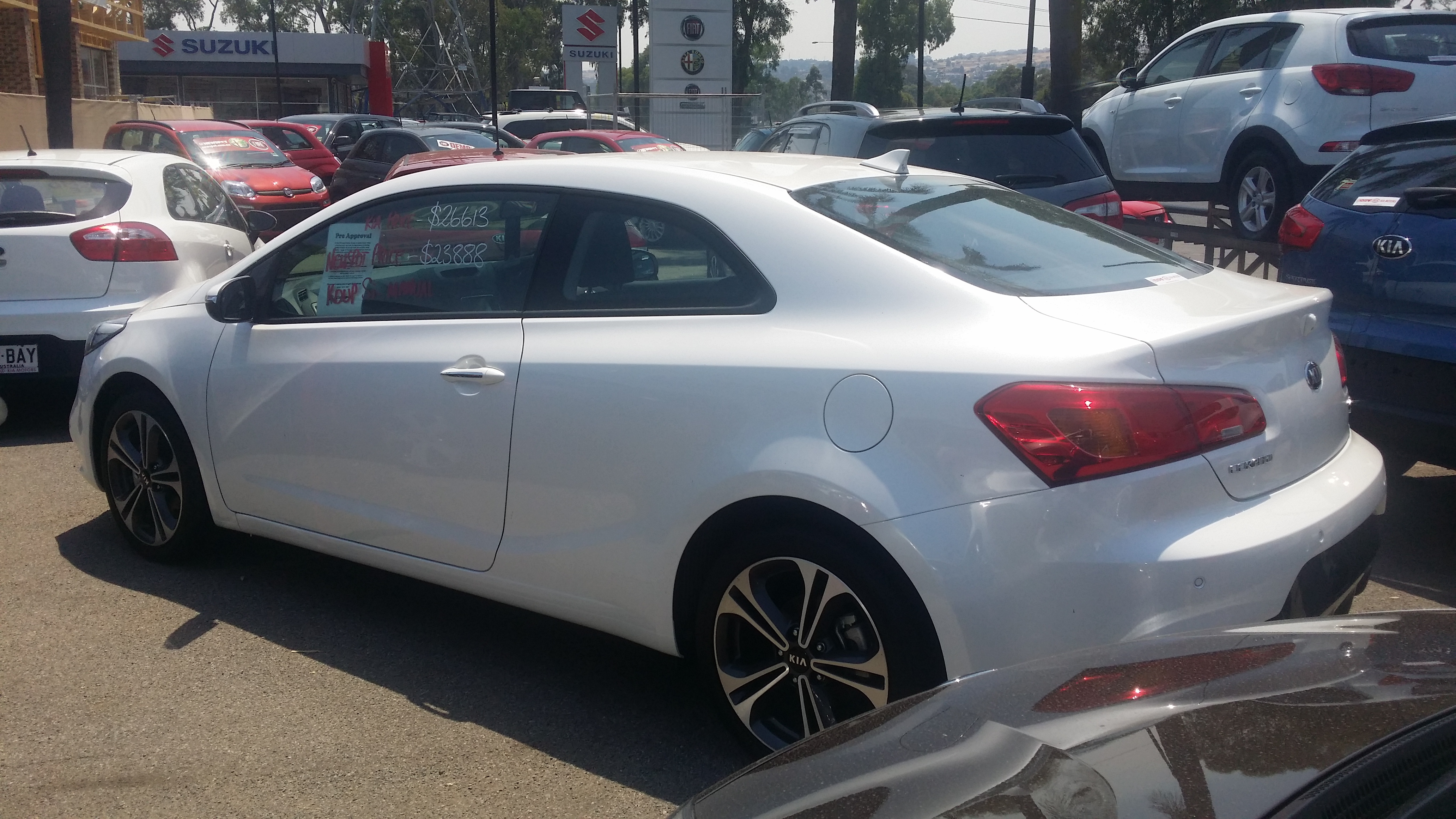 2014 Kia Cerato Koupe